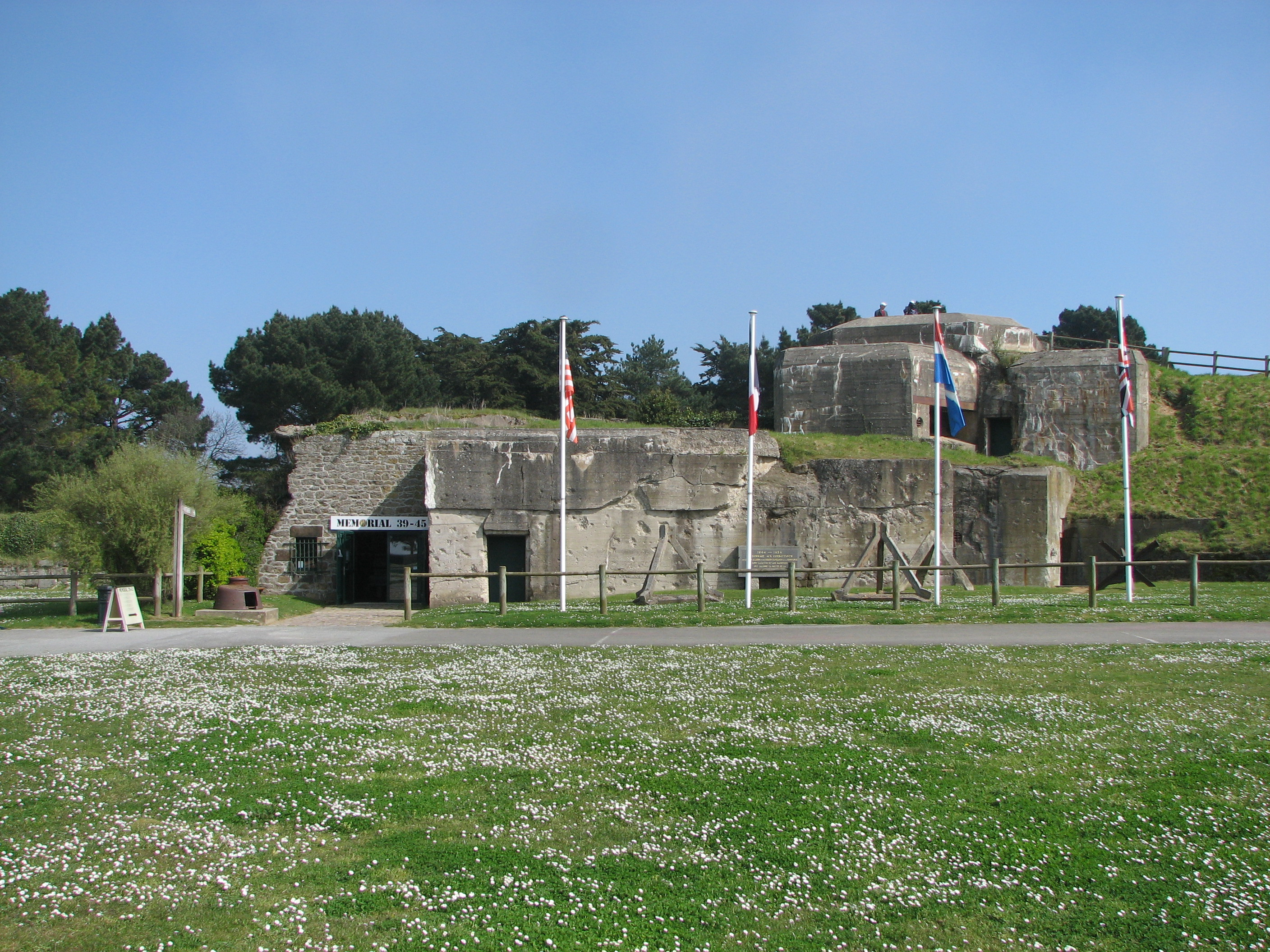 Ensemble de blockhaus dans le fort de la cité d'Aleth, Saint-Malo avec entrée du musée à gauche german blockhaus in the old fort of the Cité d'Aleth, Saint-Malo with the museum entrance on the left